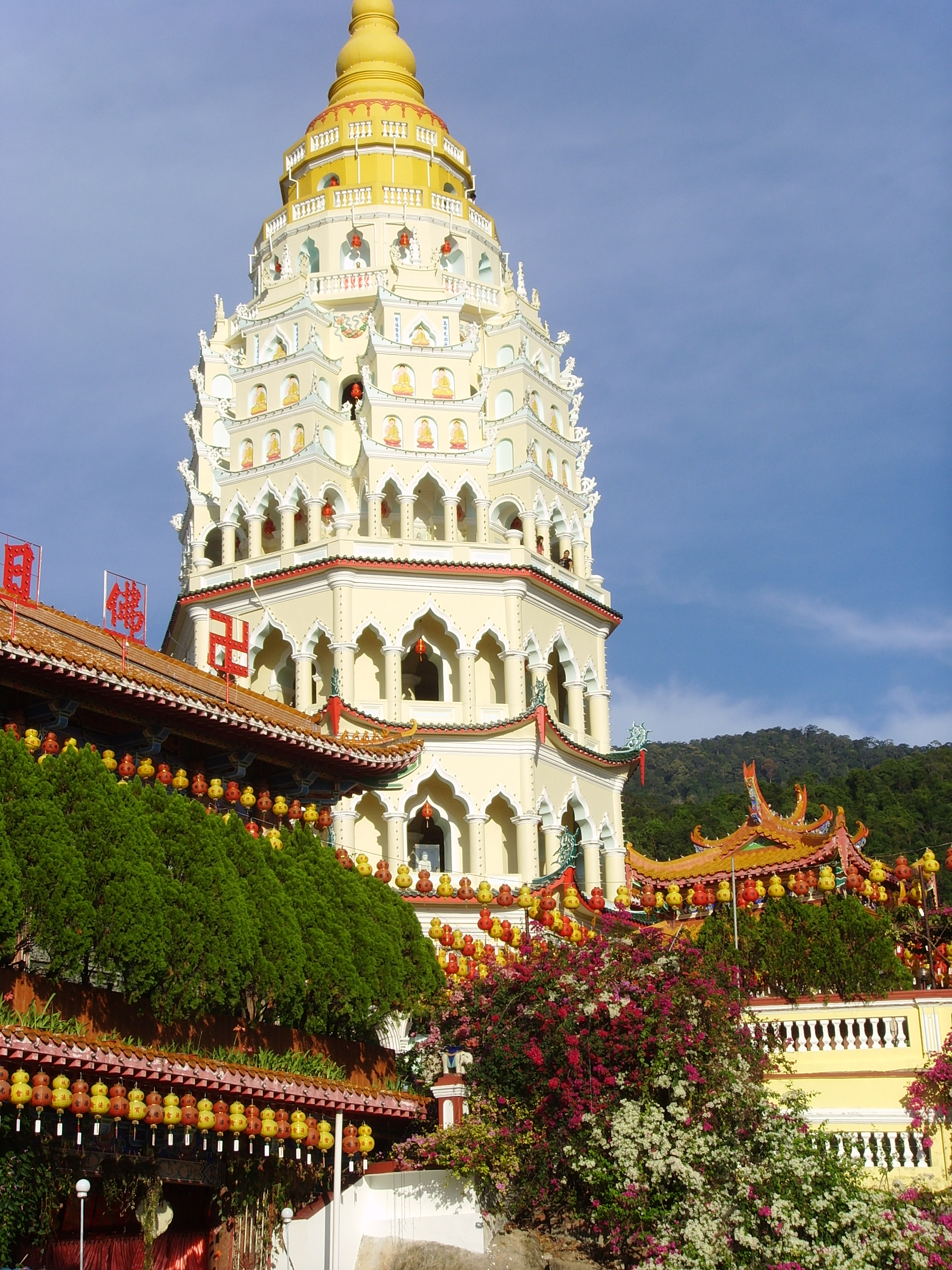 Pagode (Kek Lok Si-Tempel)